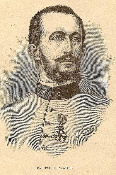 portrait.